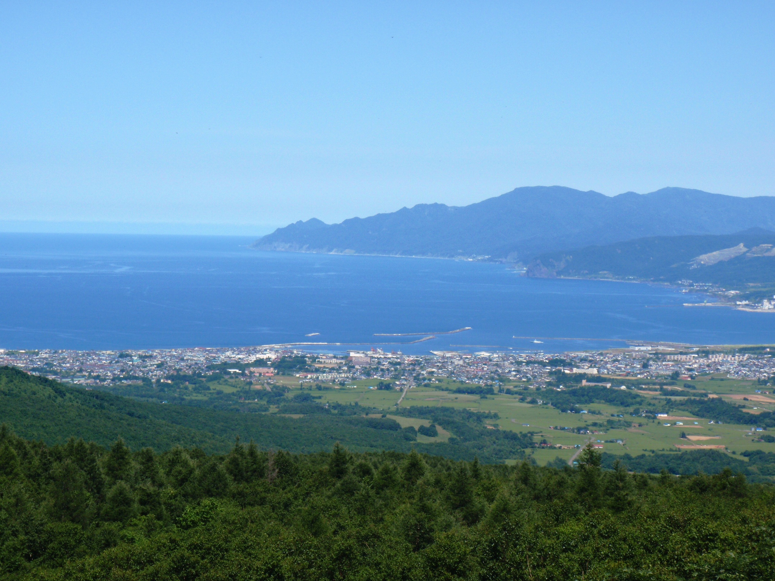 ニセコパノラマライン（道道66号）から見る岩内町市街地。撮影場所は共和町。